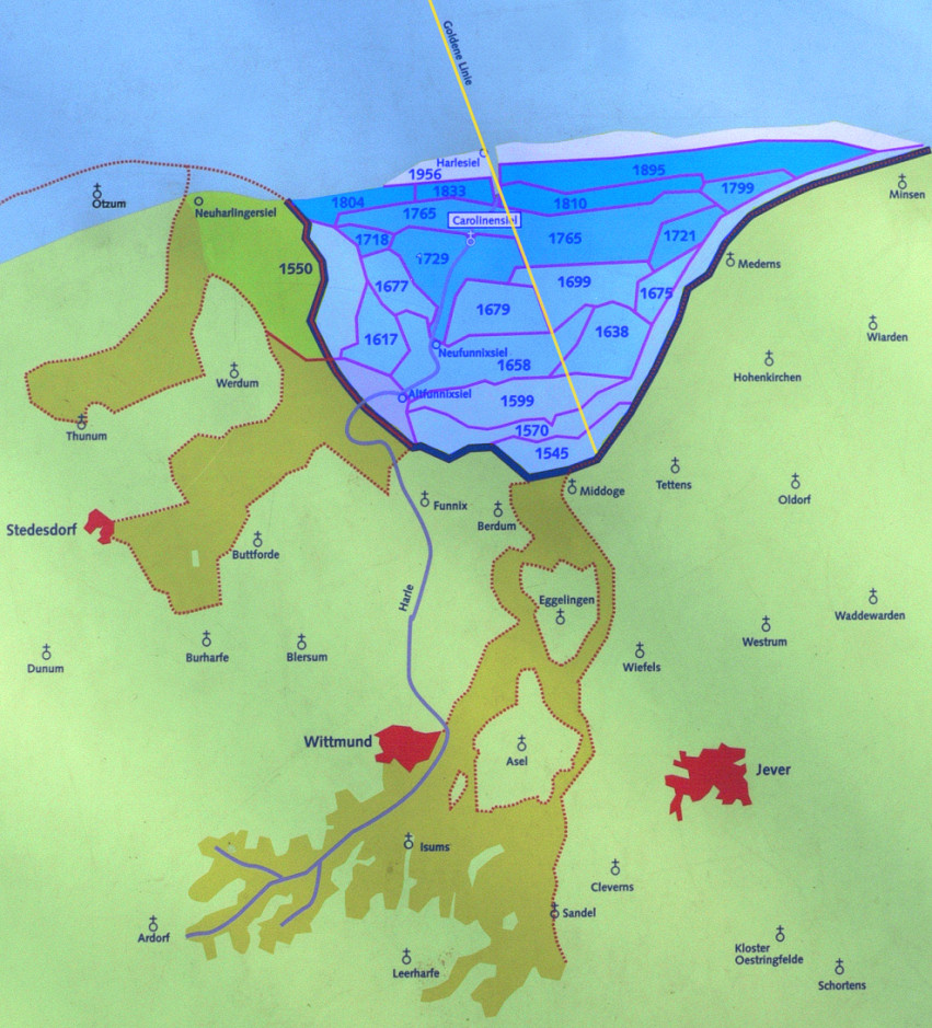 Frühere Harlebucht, auf einem öffentlich aufgestellten Schild